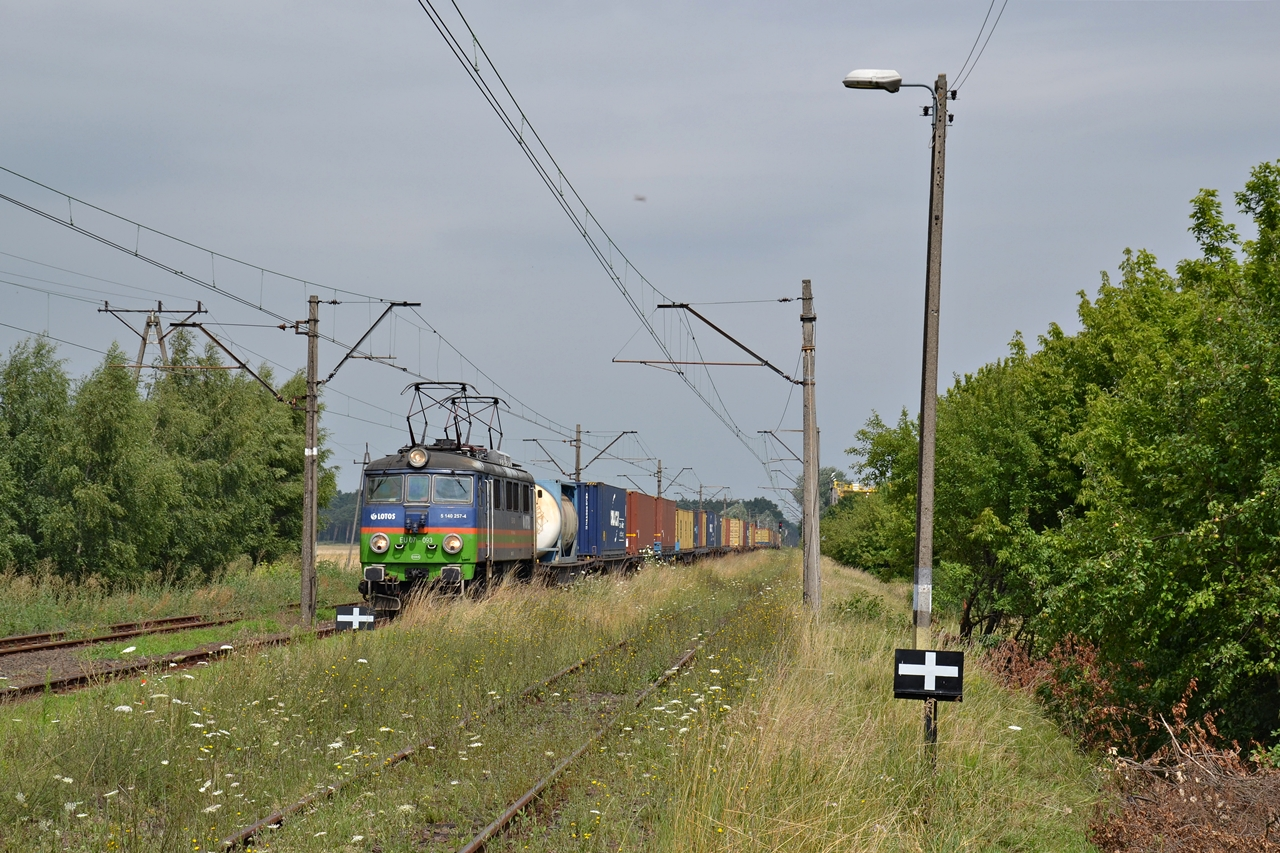 Lokomotywa elektryczna EU07-093 w malowaniu przewoźnika Lokomotiv przejeżdża z pociągiem towarowym przez Orzechowo.